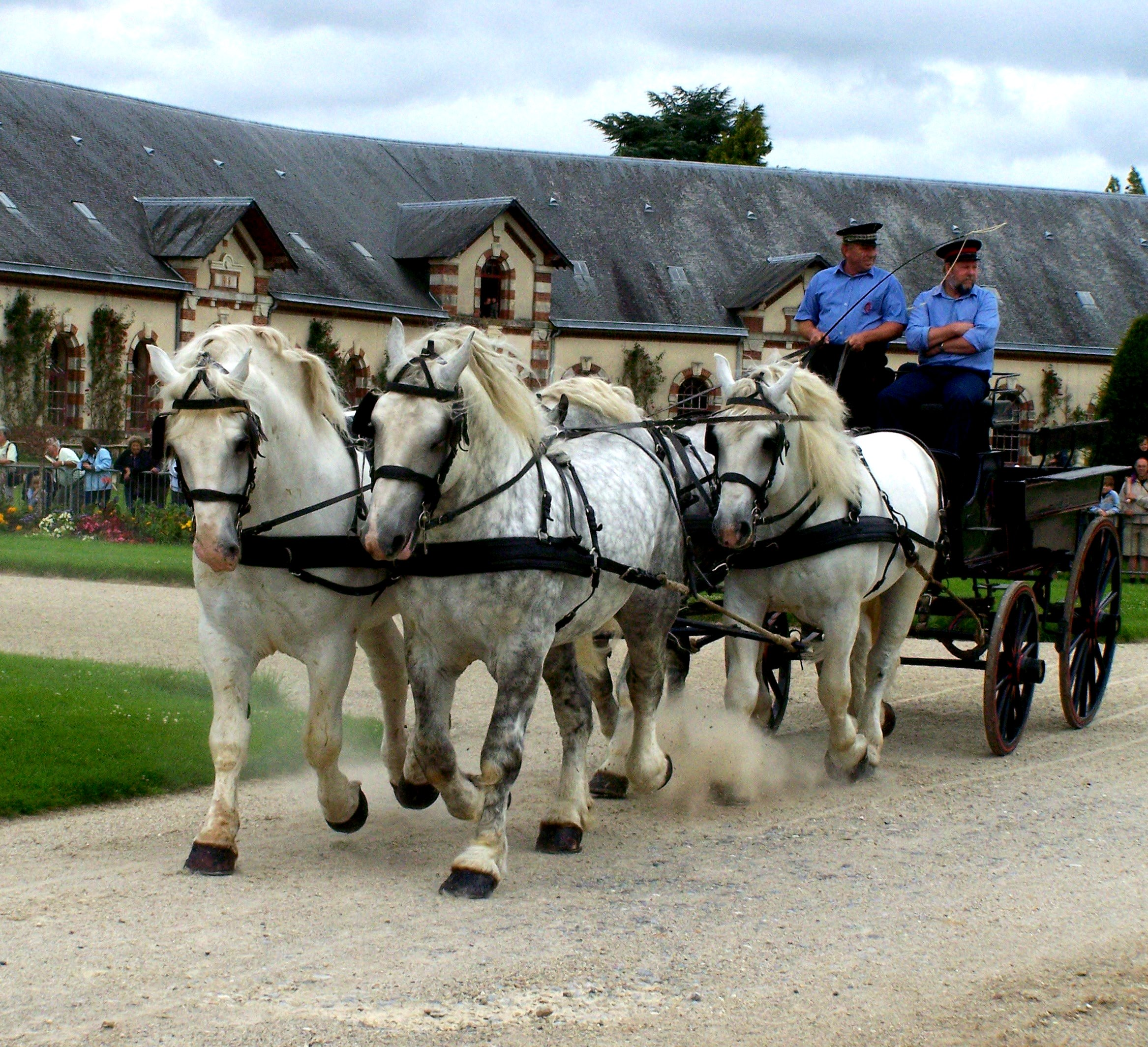 Percherones